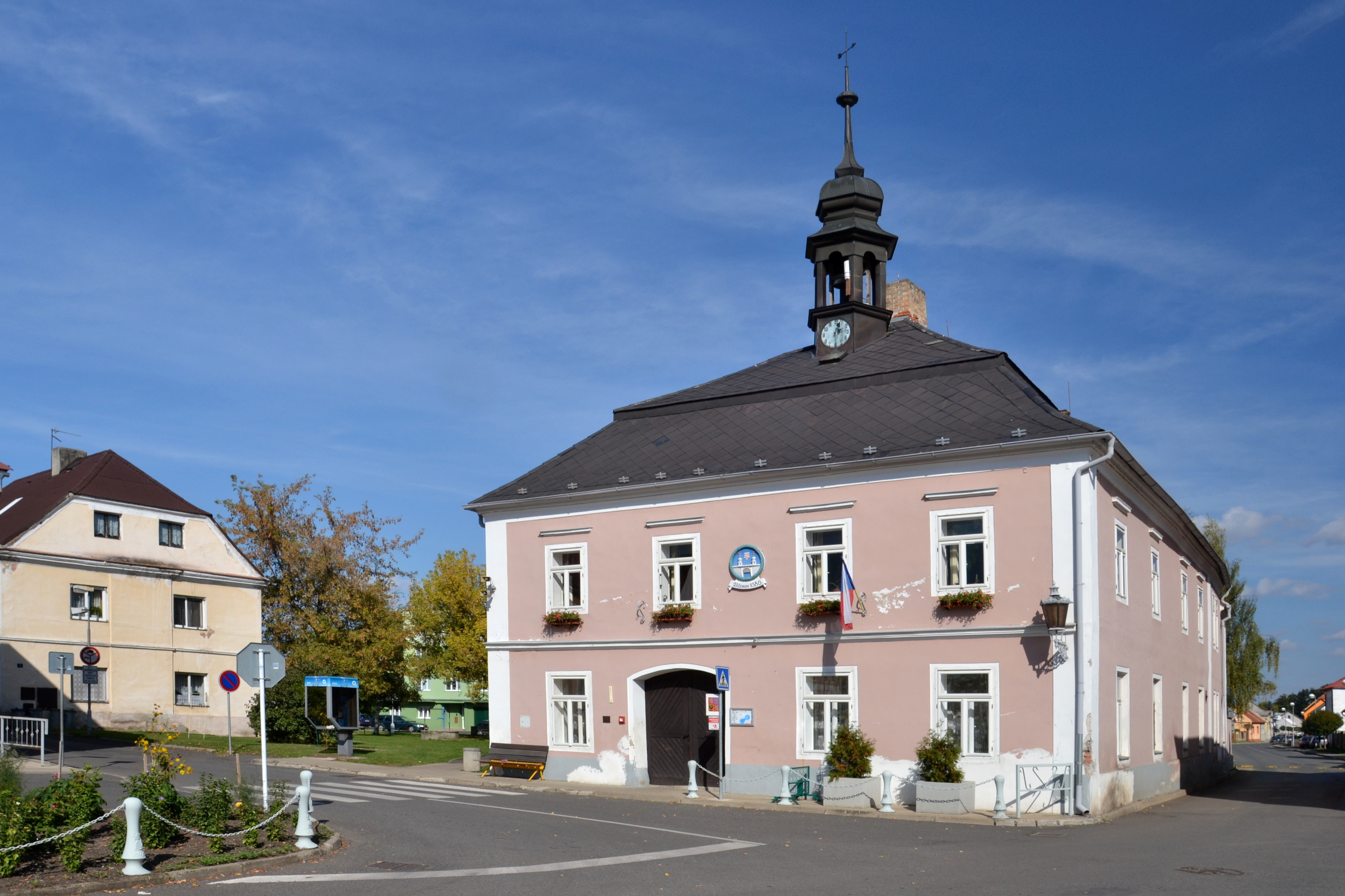 Měšťanský dům (Vilémov), Vilémov 1